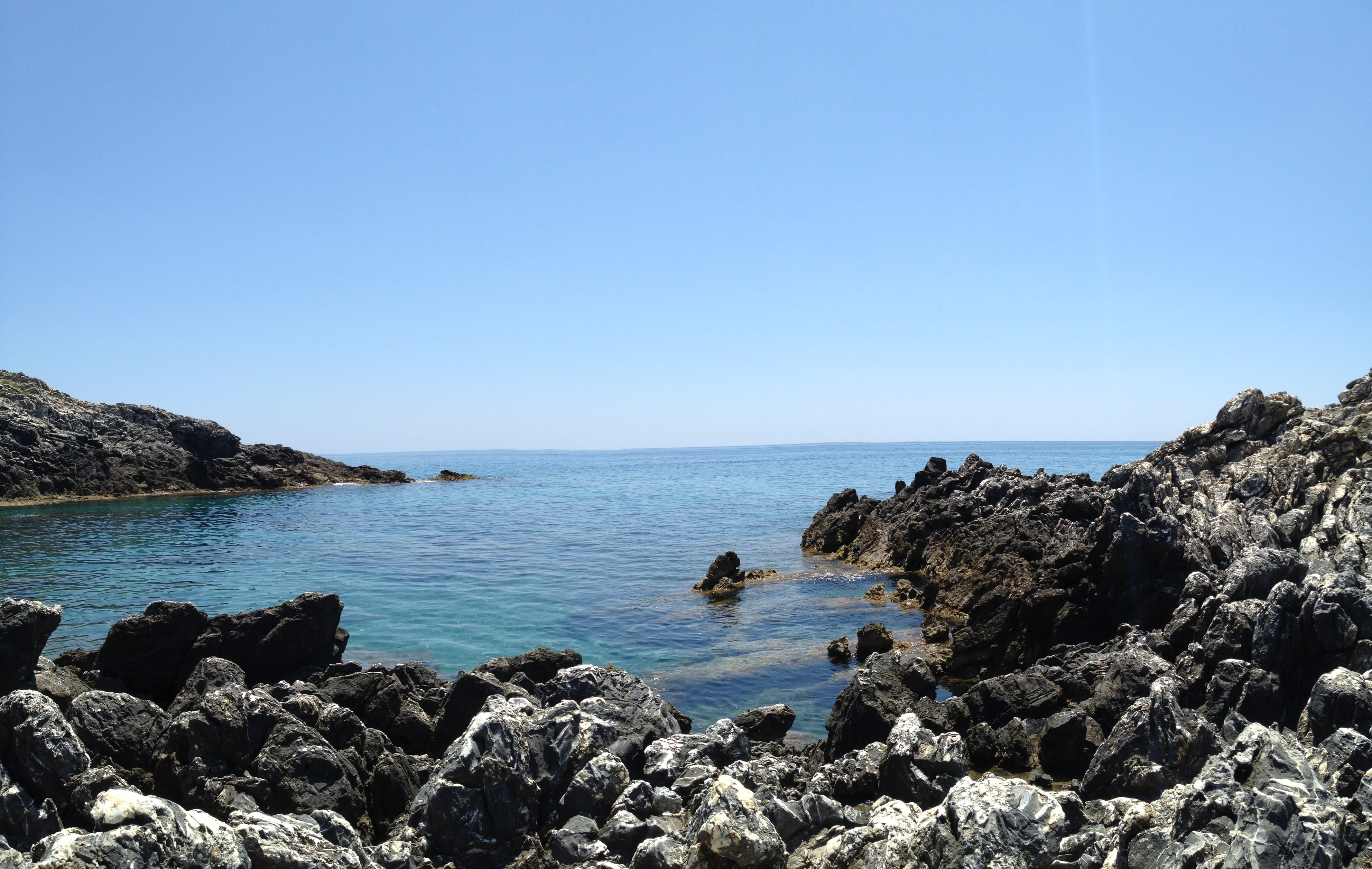 Impressionen vom Strand